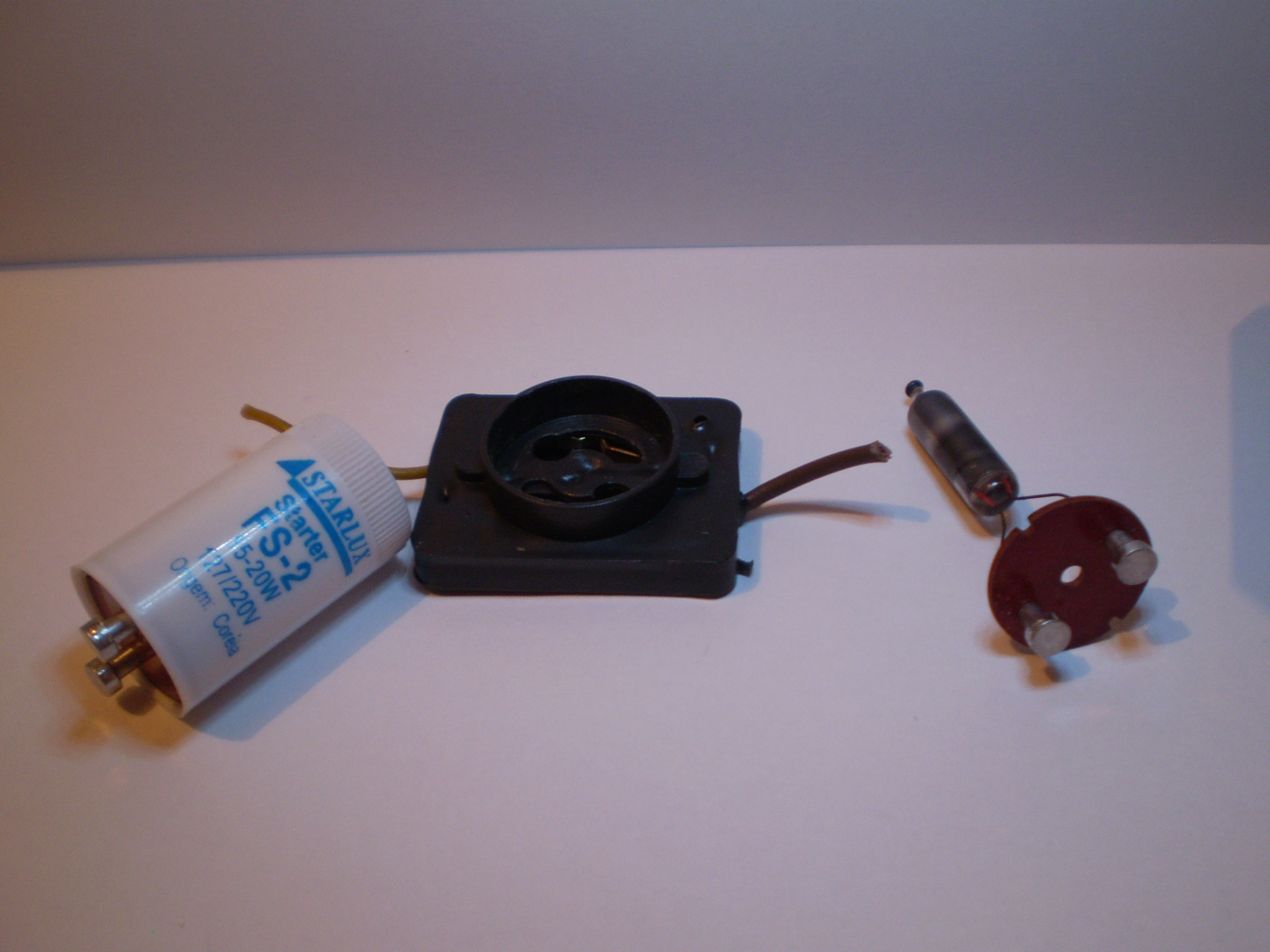 Equipamento elétrico STARTER para iluminação fluorescente